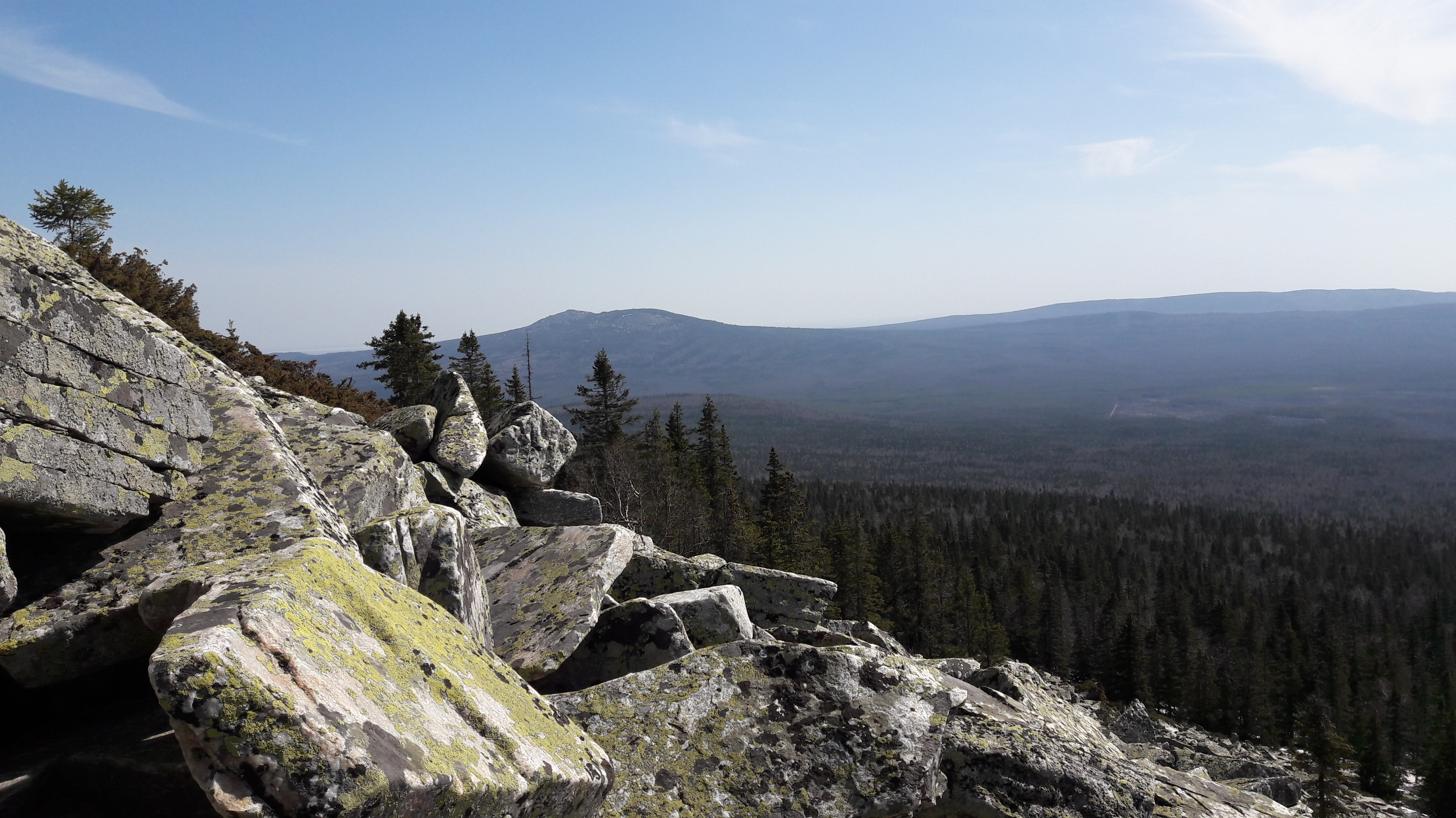 Национальный парк Таганай: Парк расположен в северной части Златоустовского и Кусинского районов Челябинской области. К южным границам парка примыкает участок Южно-Уральской железной дороги и автодорога Златоуст – Миасс. Территория национального парка включает в себя северную часть средне-высотных хребтов Южного Урала, представляющих собой обособленный горный узел, с трех сторон переходящий в плоскогорья и далее – в лесостепь. Протяженность территории национального парка с юга на север – 52 км, с запада на восток 10-15 км, Златоуст, Челябинская область This image is related to the protected area of Russia number 7400102